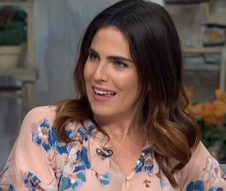 Karla Souza entrevista